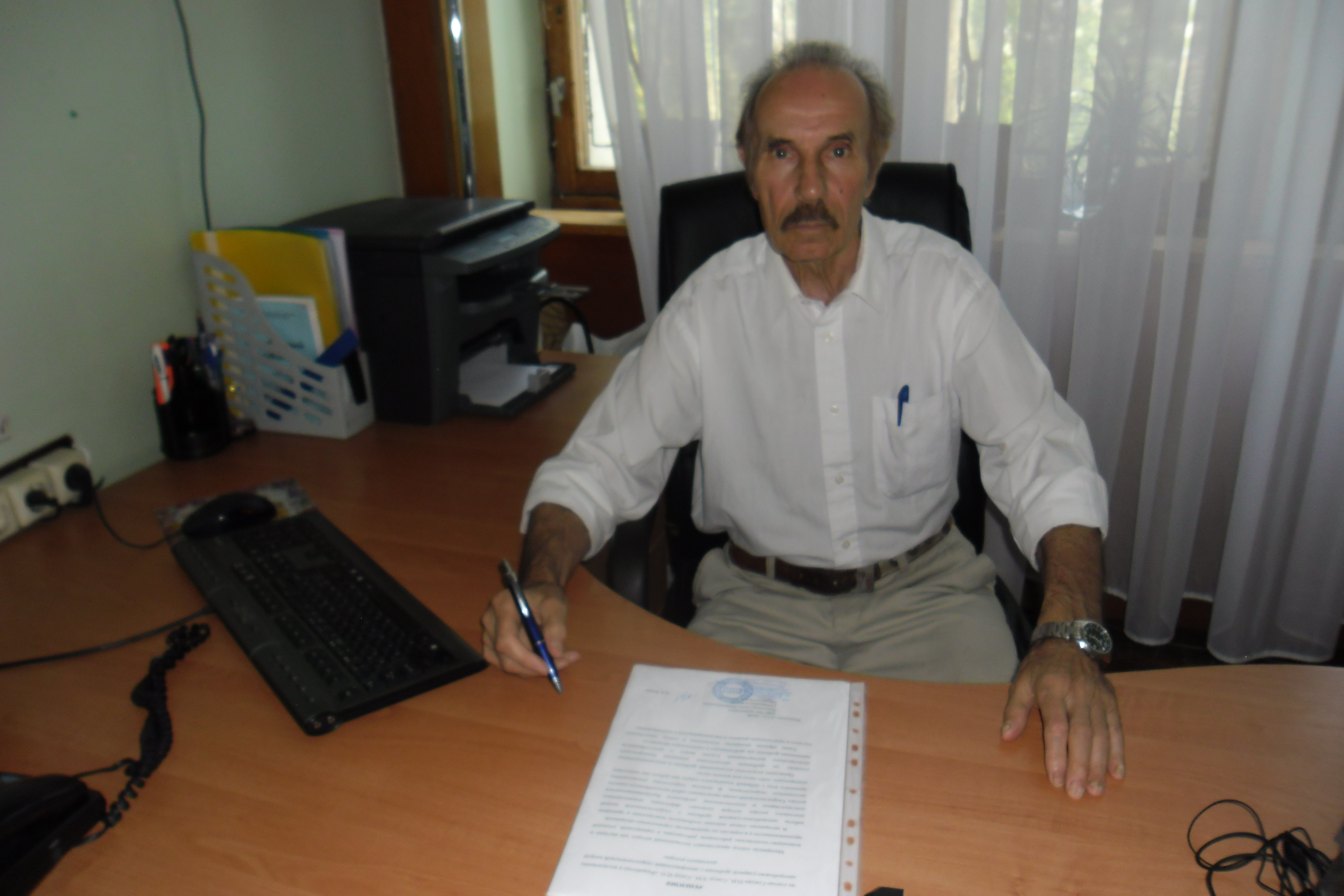 Фото